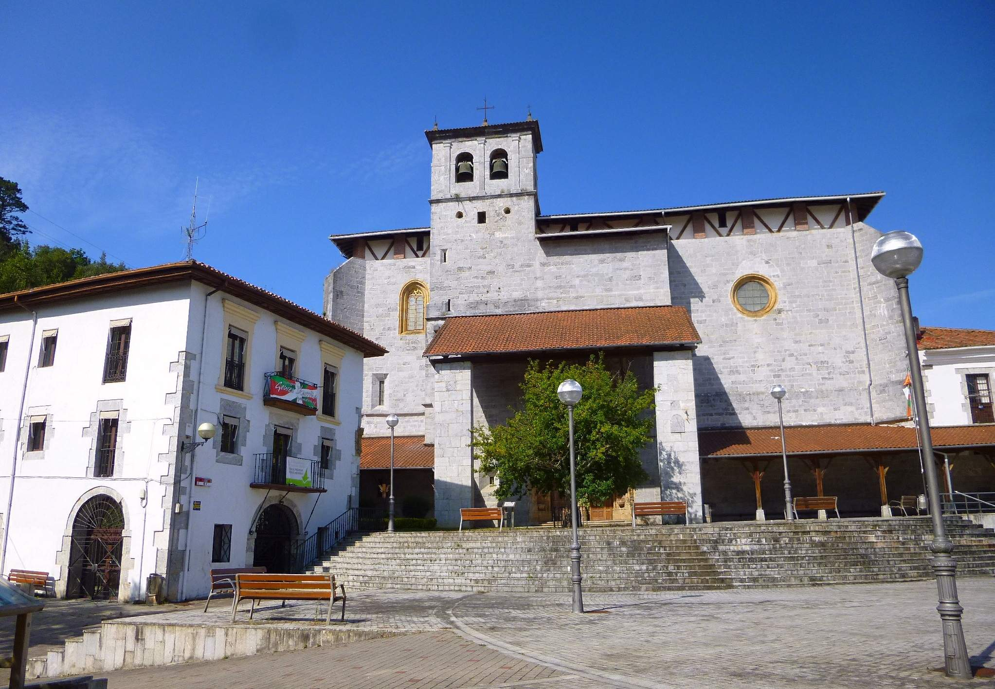 Axpe (Busturia) - Iglesia de Santa María de Axpe y Ayuntamiento